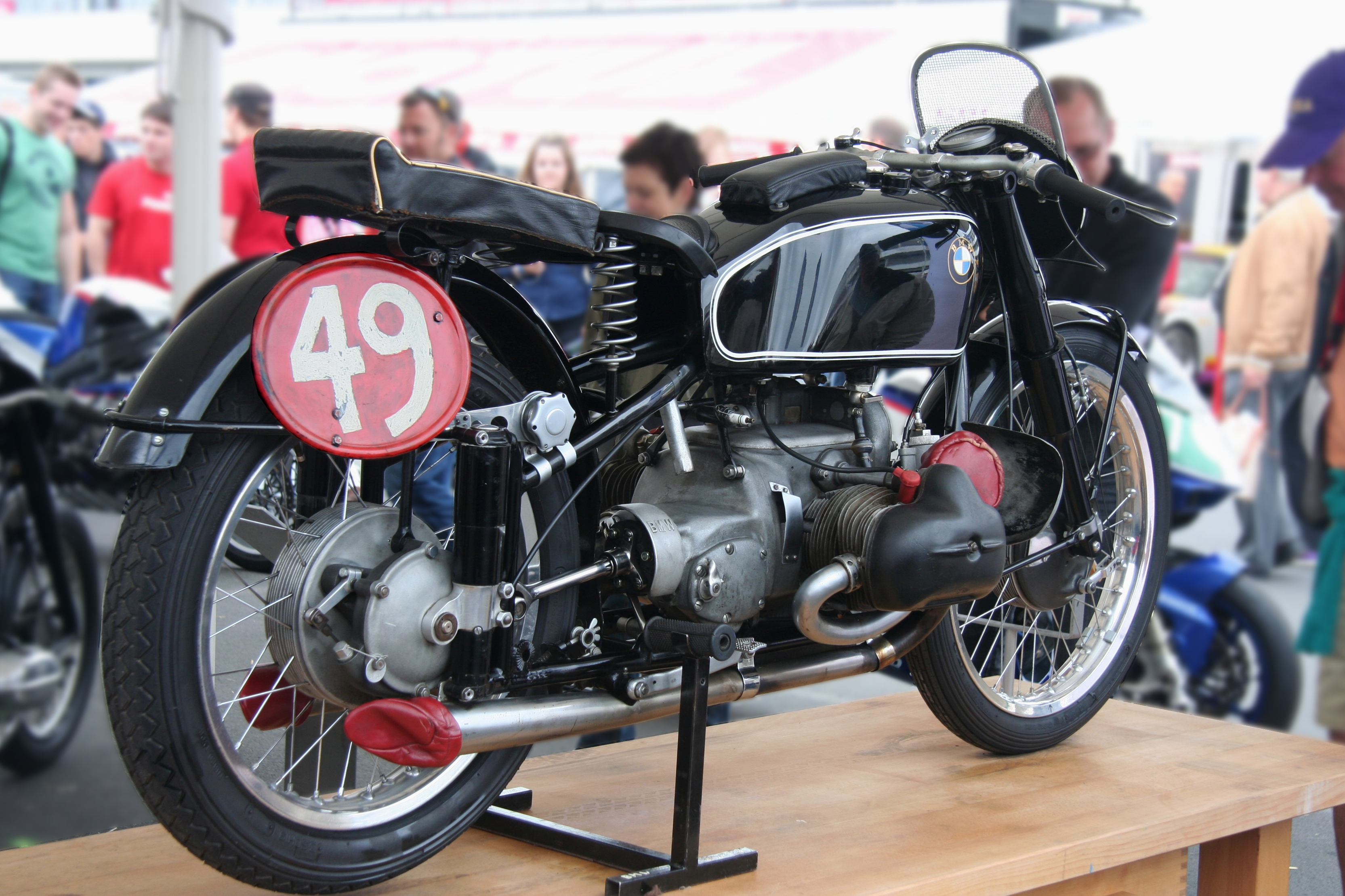 BMW RS 500, Typ 255, 500 cm³ mit Kompressor, Leistung ca. 55–60 PS. Wahrscheinlich die Maschine, die John Surtees besaß. und BMW überließ